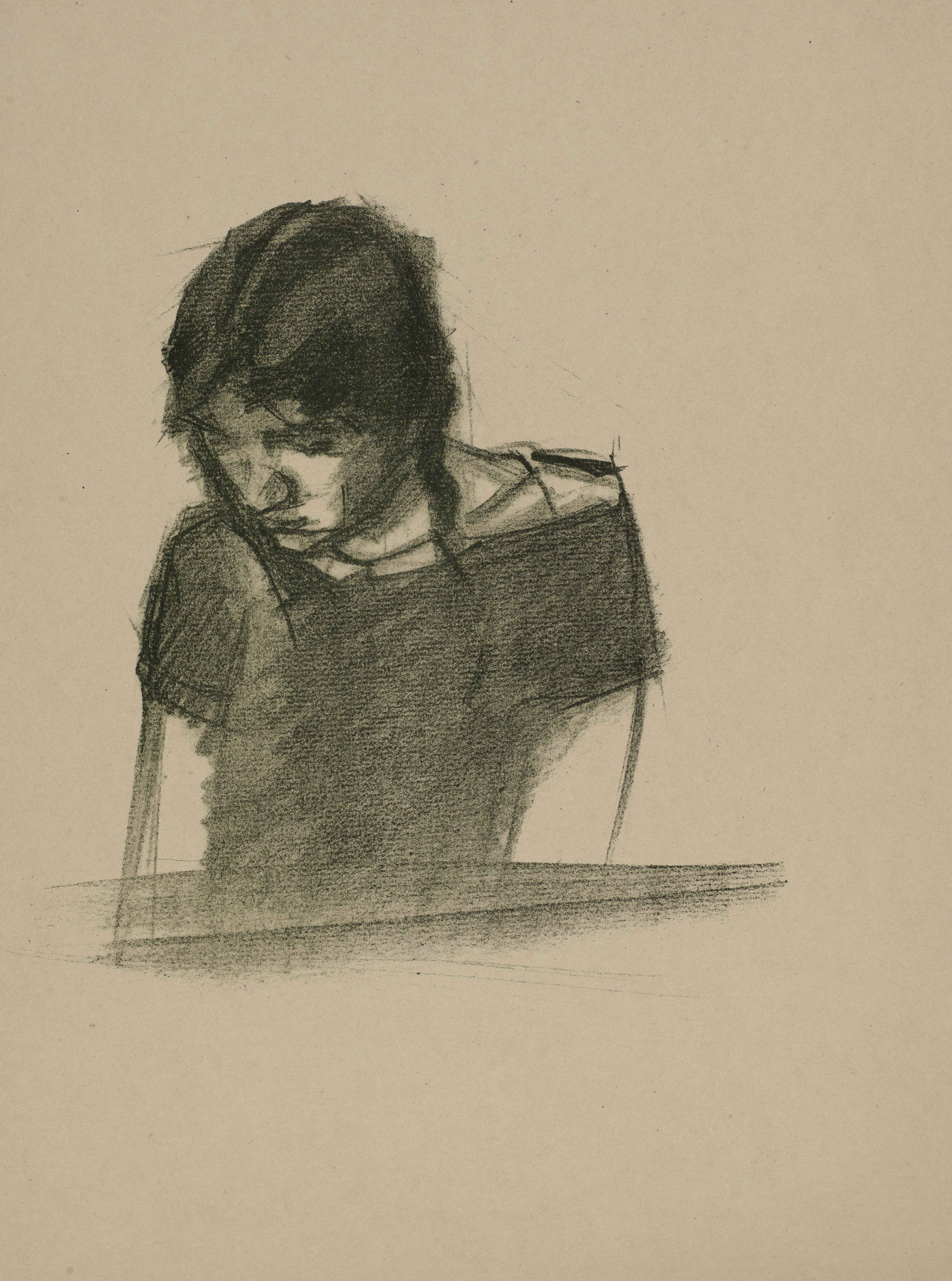 Tochter Maja V: Studie, 1920er Jahre, 36,2x31,2